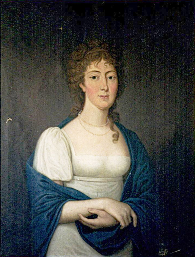 Marie Friederike von Hessen-Kassel, Ehefrau von Alexius Friedrich Christian (Anhalt-Bernburg)